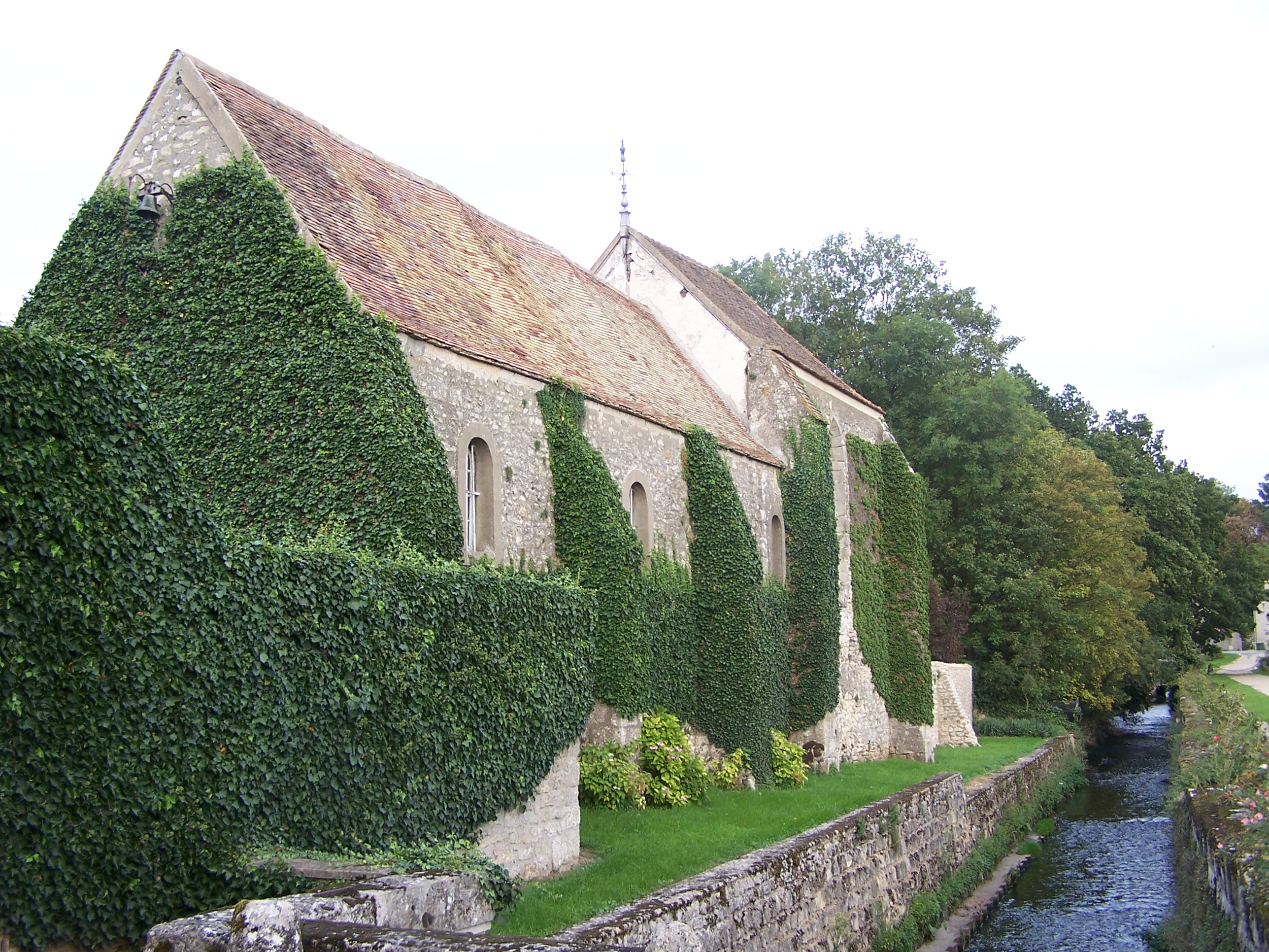 Chapelle Saint-Nicolas à Rennemoulin (Yvelines, France). Photo personnelle. Saint-Nicolas chapel in Rennemoulin (Yvelines, France). Personal photo. Auteur/Author : Henry Salomé